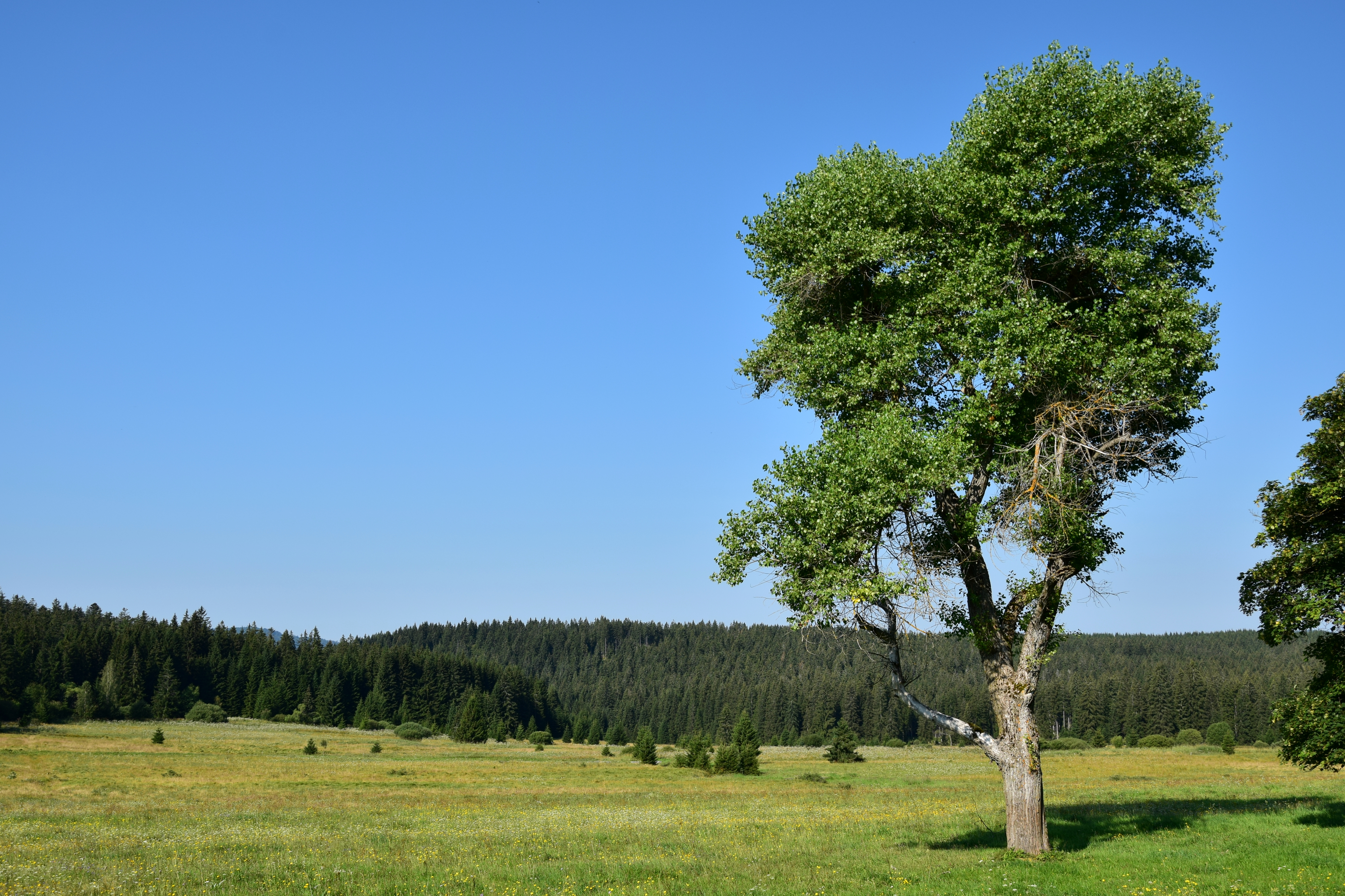 Zhůřská plán – jižní část chráněného území od východu